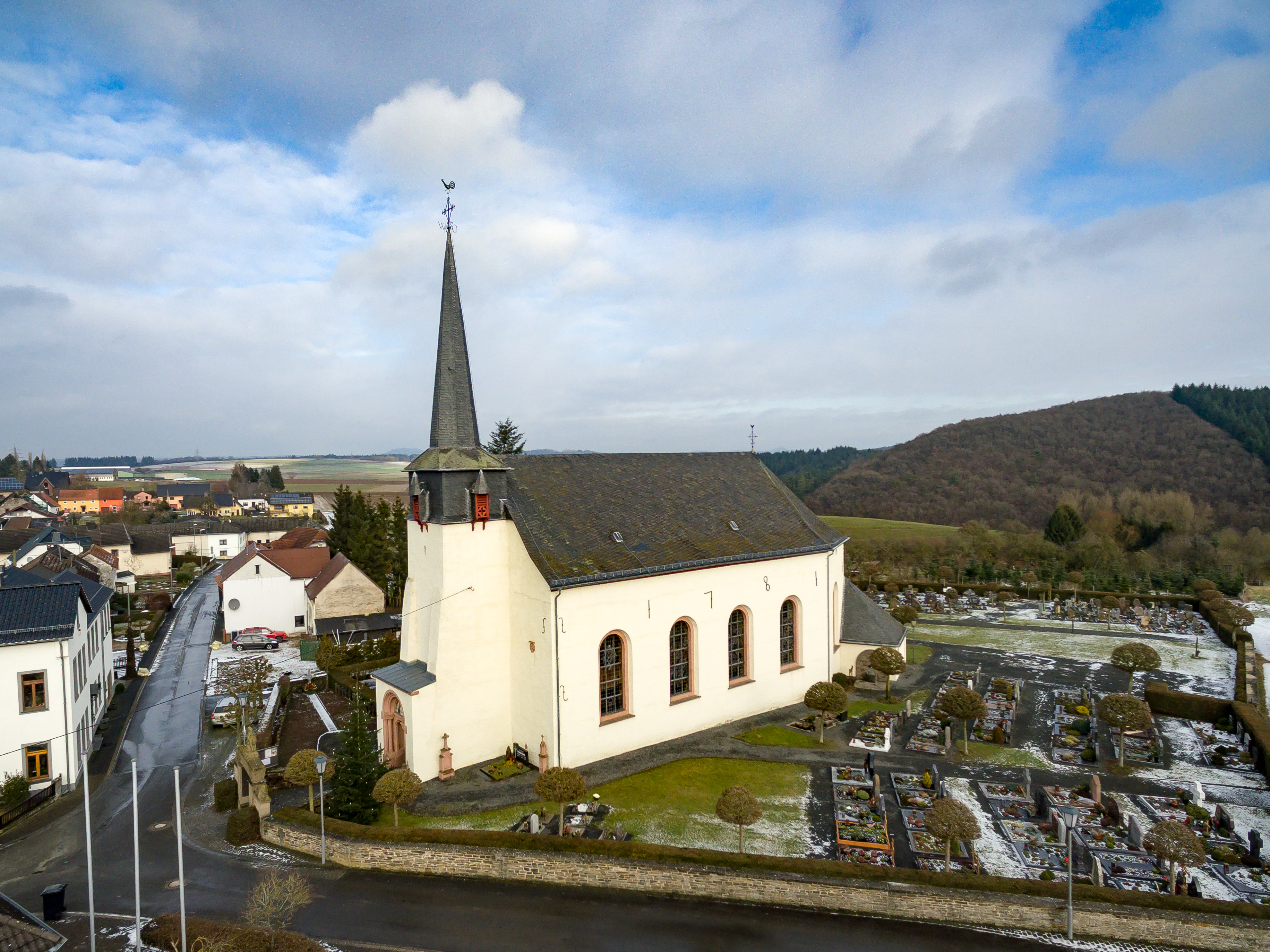 St. Martin (Nohn, Eifel)